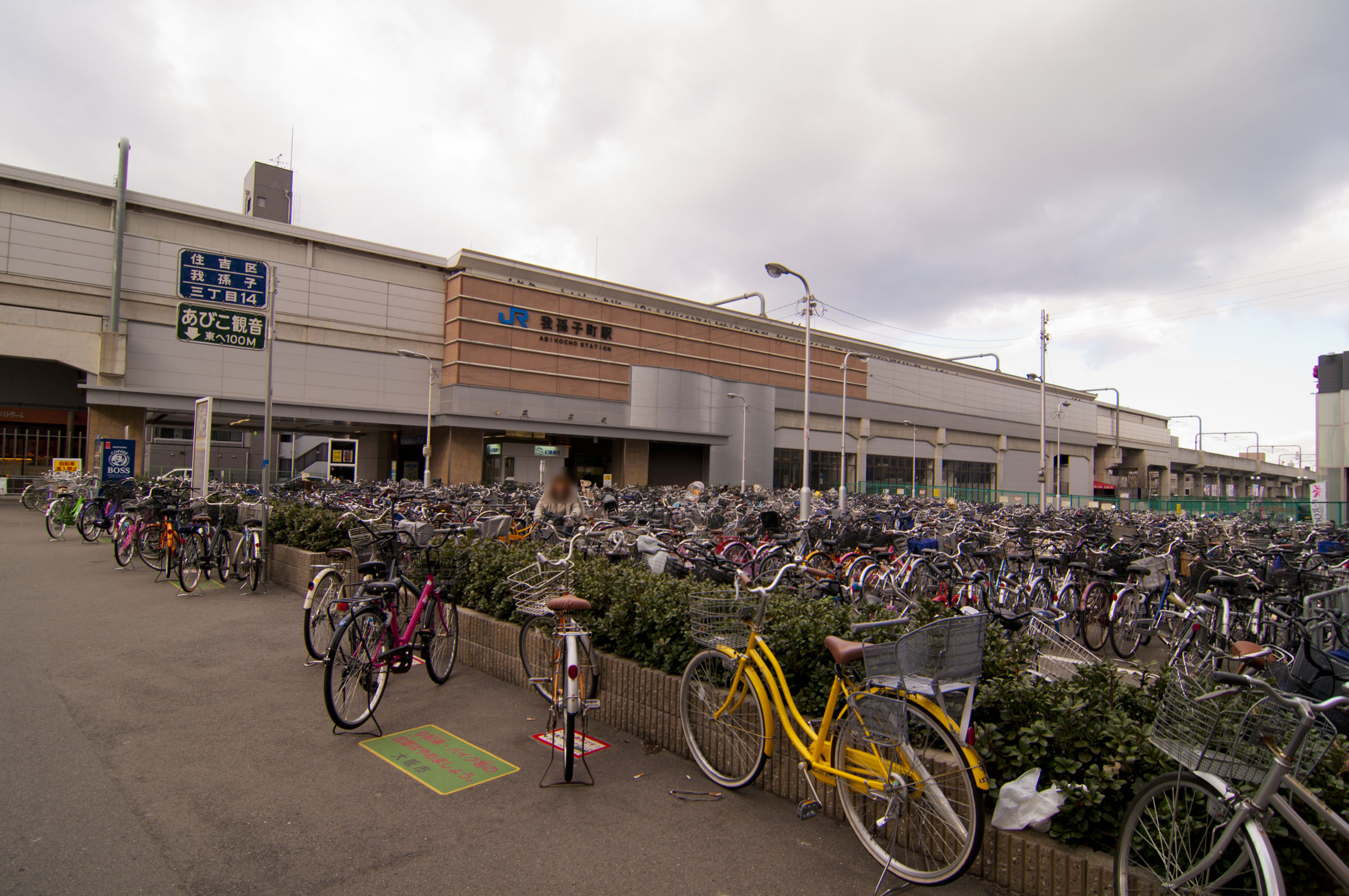 西日本旅客鉄道阪和線我孫子町駅